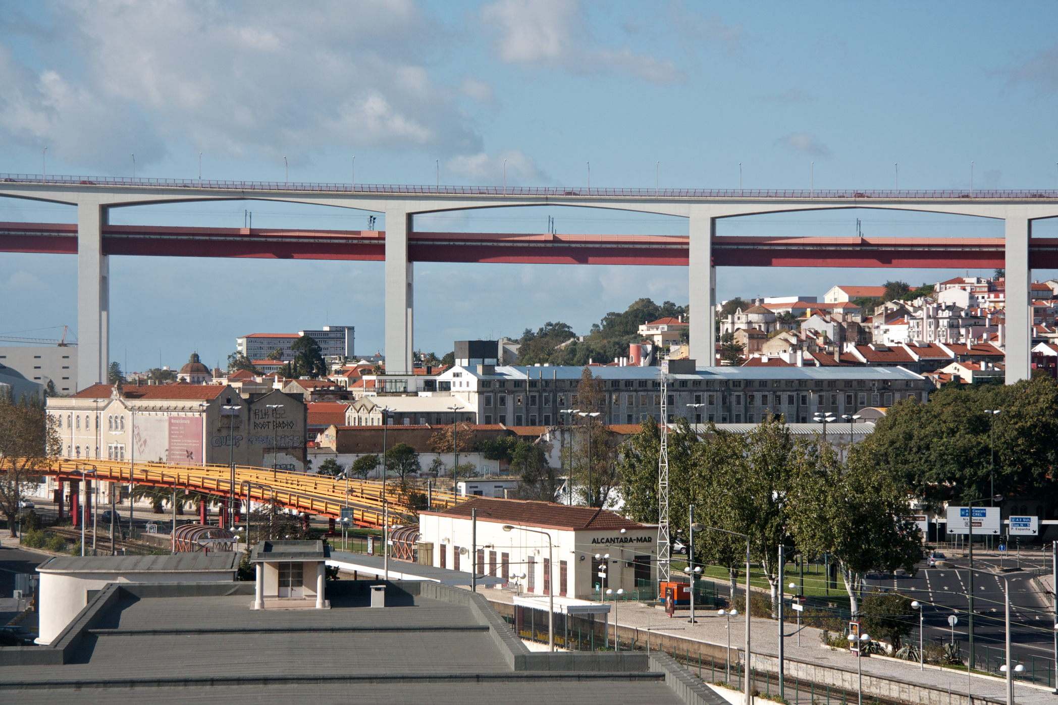 Tipo: E [ Estação ] Local: Alcântara [Linha de Cascais , PK 2 • Linha de Cintura , PK 1] Data e hora: 6 de Novembro de 2011 [10h40]